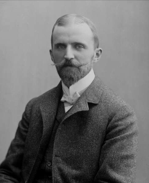 Norsk Folkemuseums grunnlegger og første direktør Hans Jacob Aall.